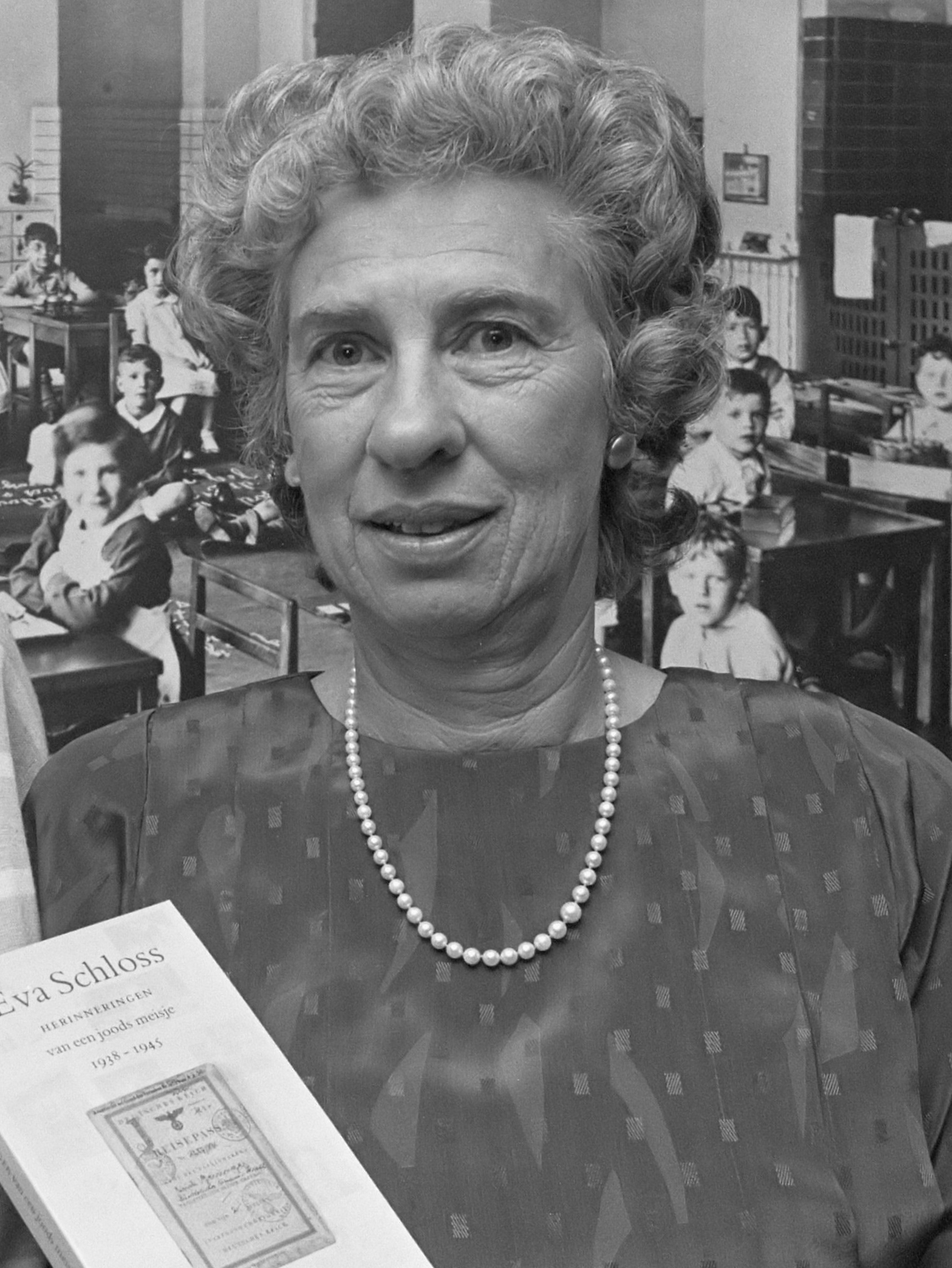 Eva Schloss presenteert het boekje "Herinneringen van een joods meisje", links haar moeder Fritzi Frank 24 april 1989